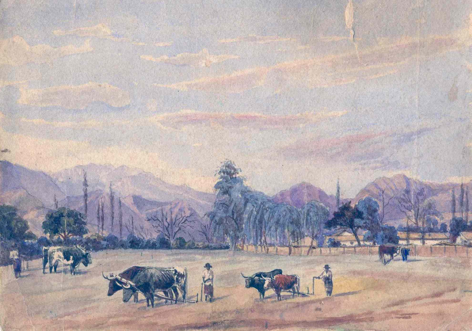 acuarela pintada por Joel Blamey - 1914